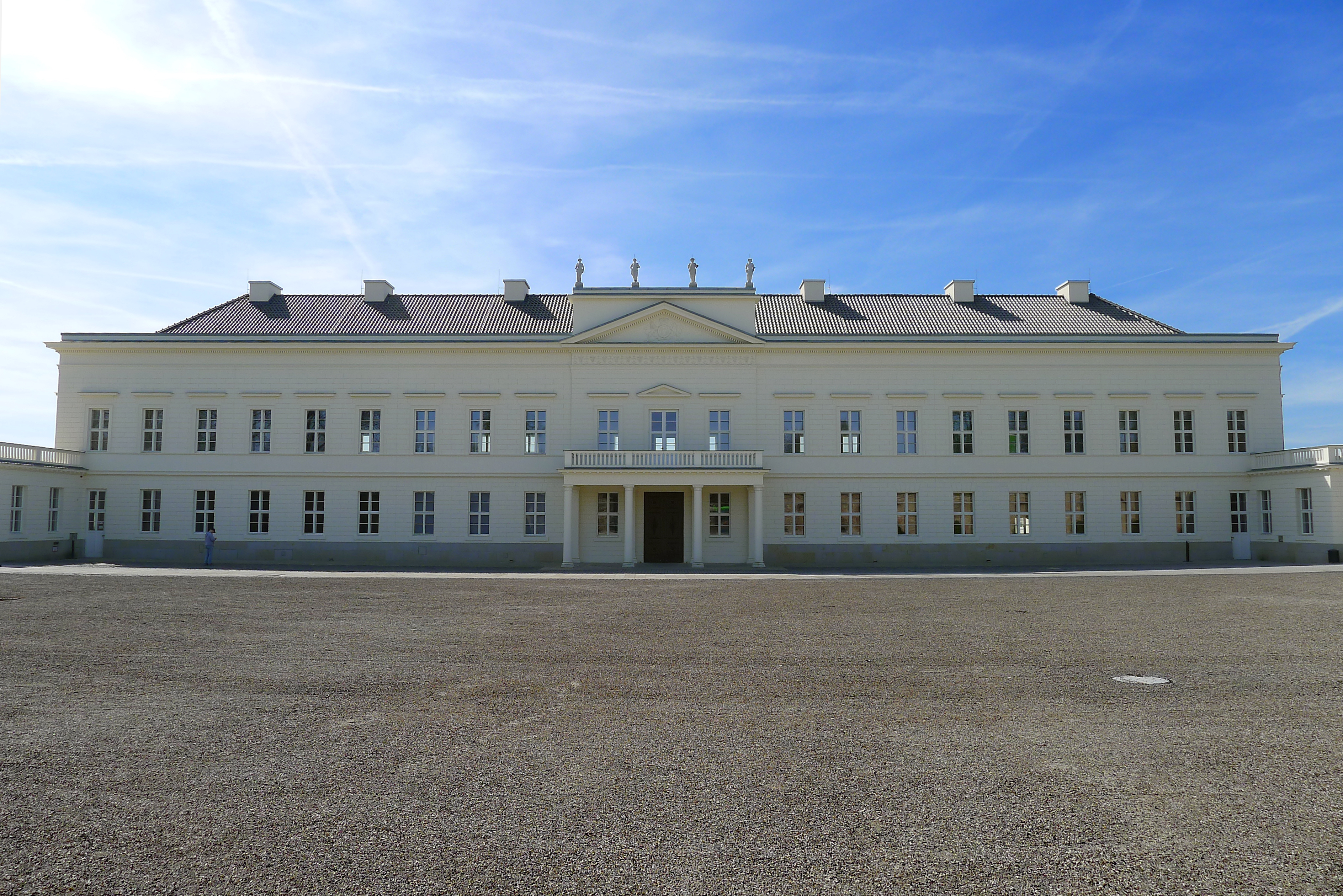 Die Ehrenhofseite des Schlosses Herrenhausen